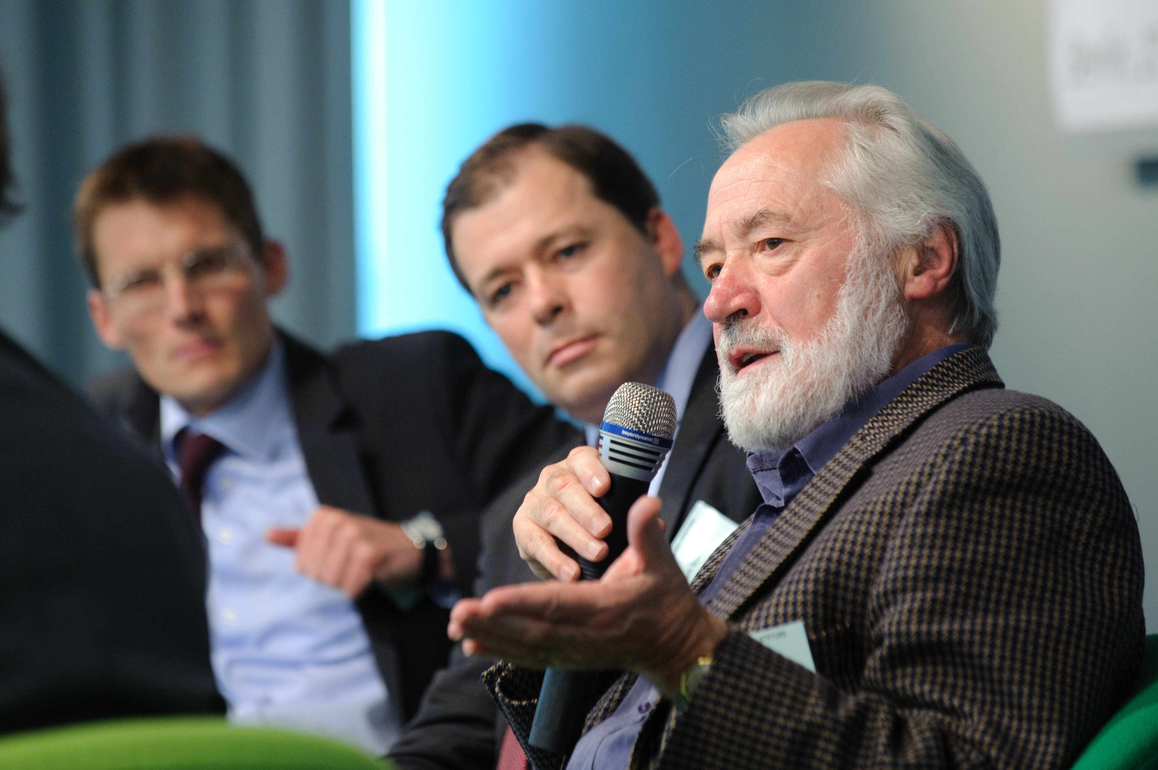 Prof. Walter Müller (Universität Mannheim) Foto: CC-BY-SA Stephan Röhl /